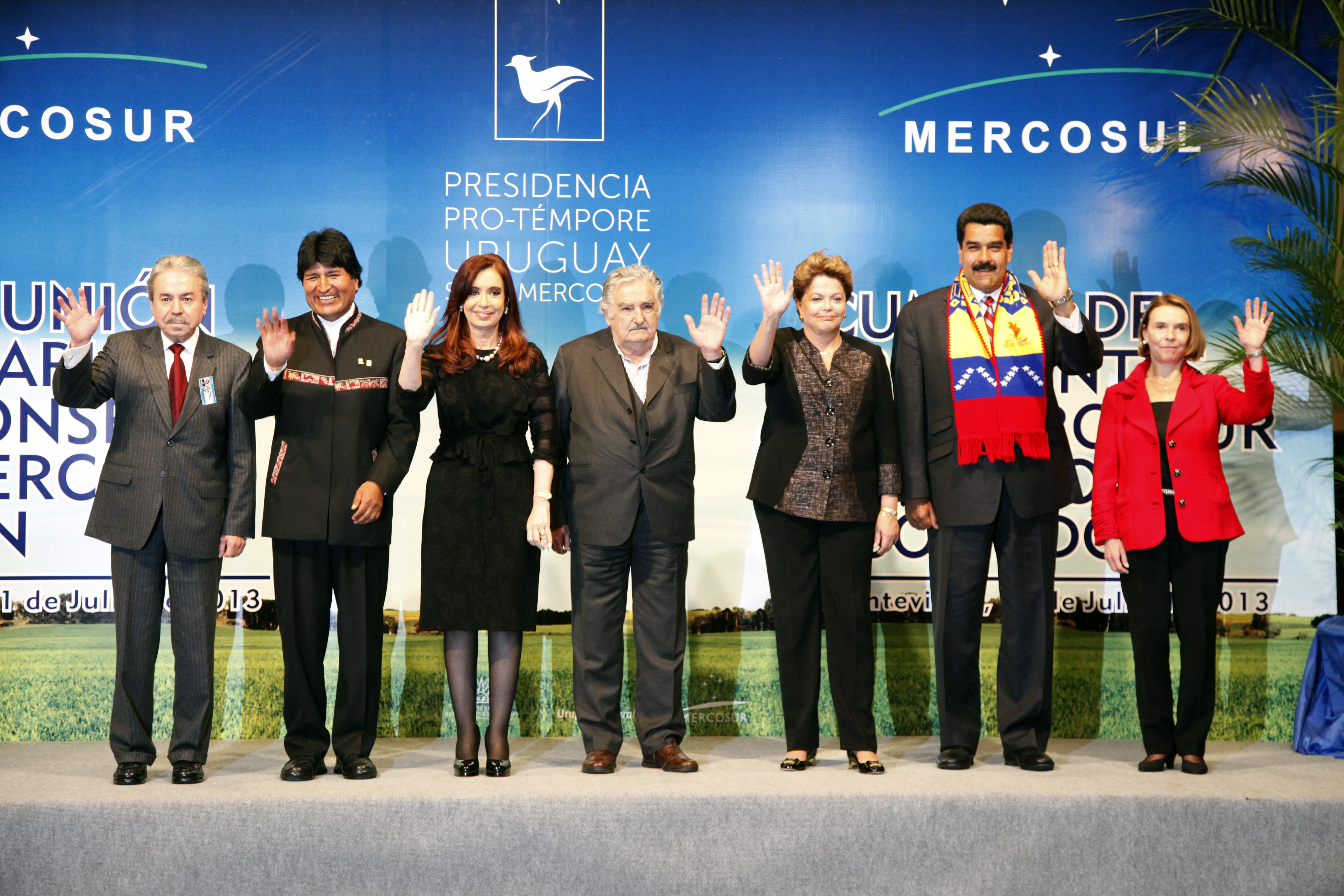 Montevideo (Uruguay). 12 de Julio del 2013. El vicepresidente de Ecuador, Jorge Glas junto al Canciller Ricardo Patiño participaron en la Reunión del Consejo del Mercado Común y Cumbre Presidencial del MERCOSUR. Foto: Xavier Granja Cedeño - Ministerio de Relaciones Exteriores y Movilidad Humana